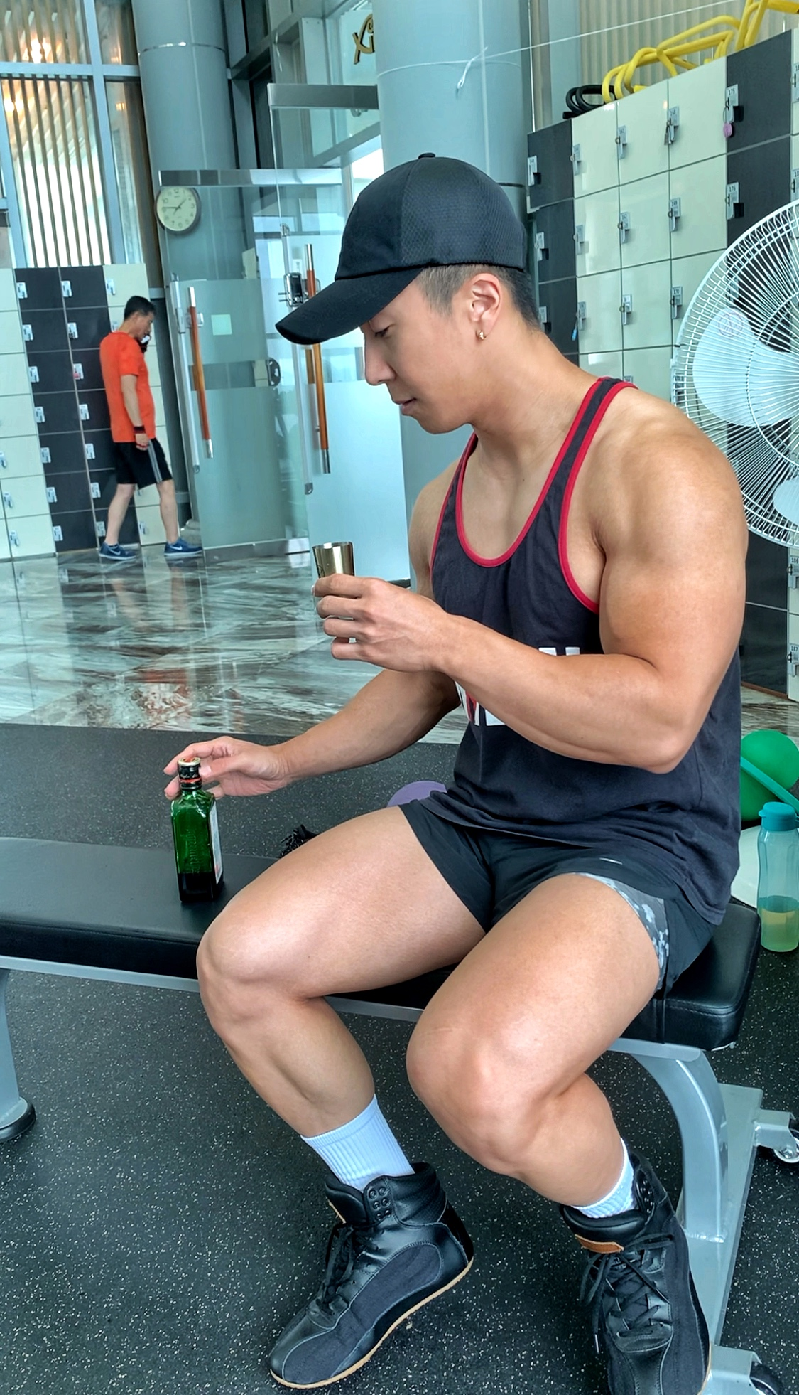 운동전 모습입니다